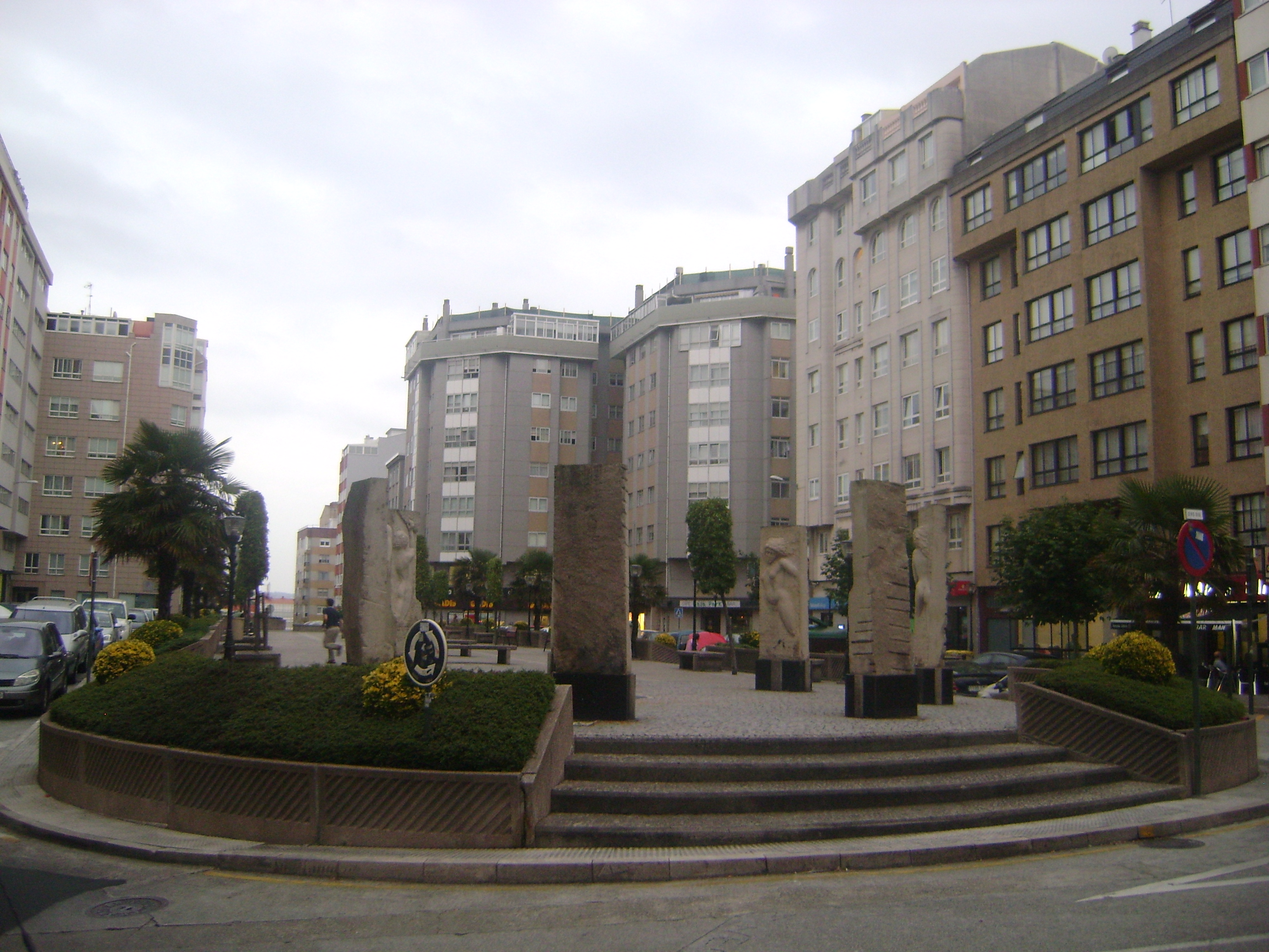 Barrio Castrillón